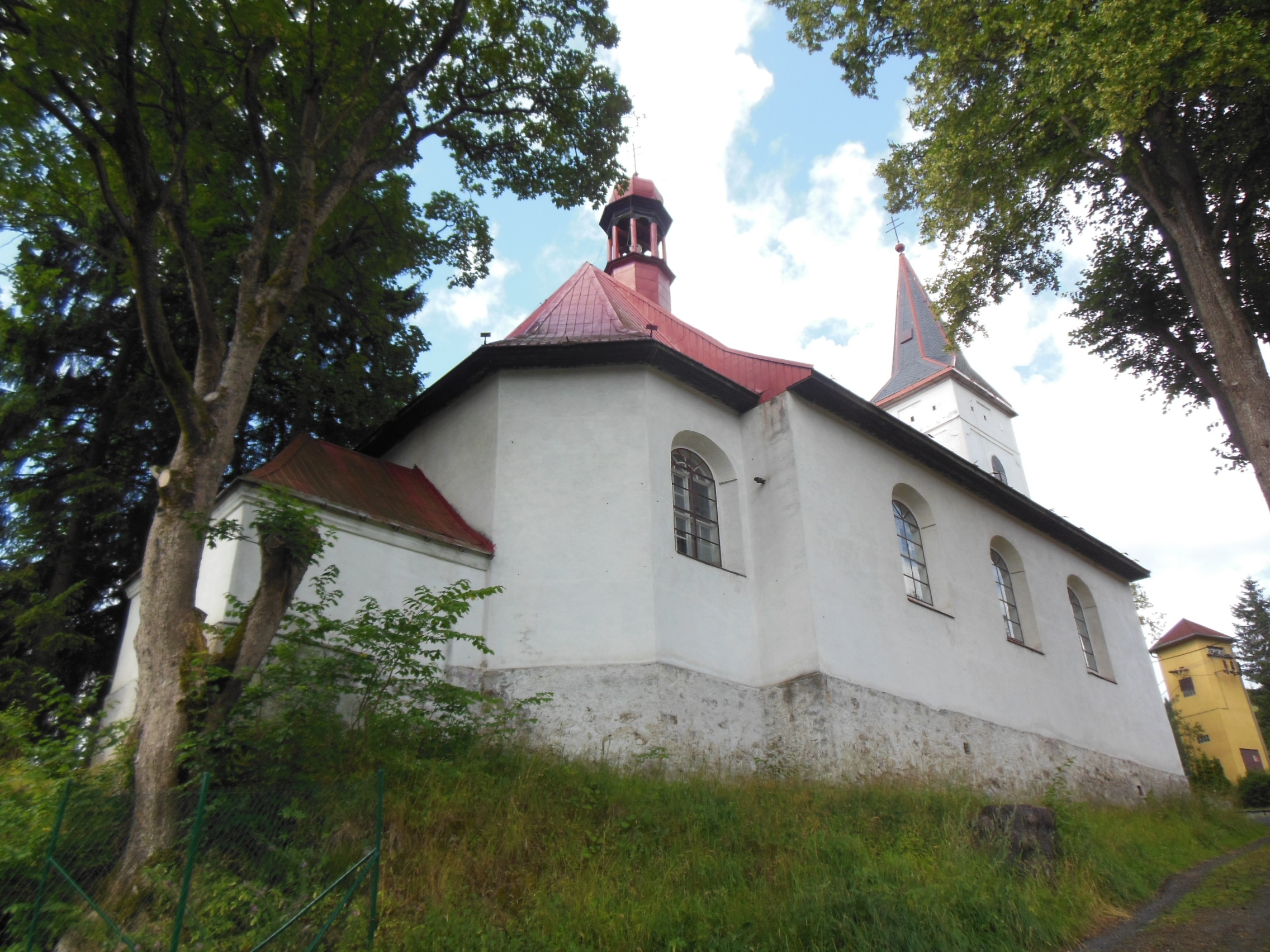 Kostel svatého Jana Nepomuckého v Nových Hamrech (okres Karlovy Vary).